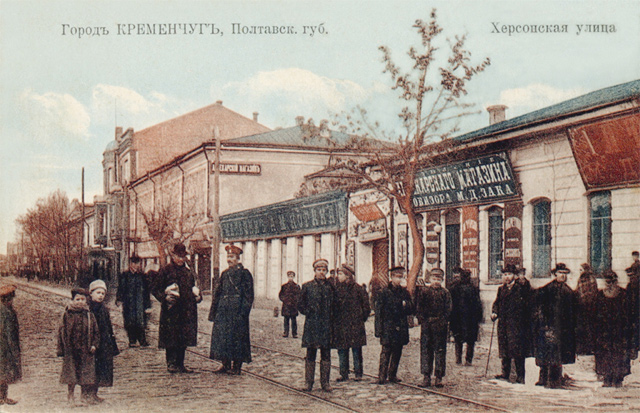 Postcards of old Kremenchuk. Вулиця Херсонська, сучасна Карла Маркса.